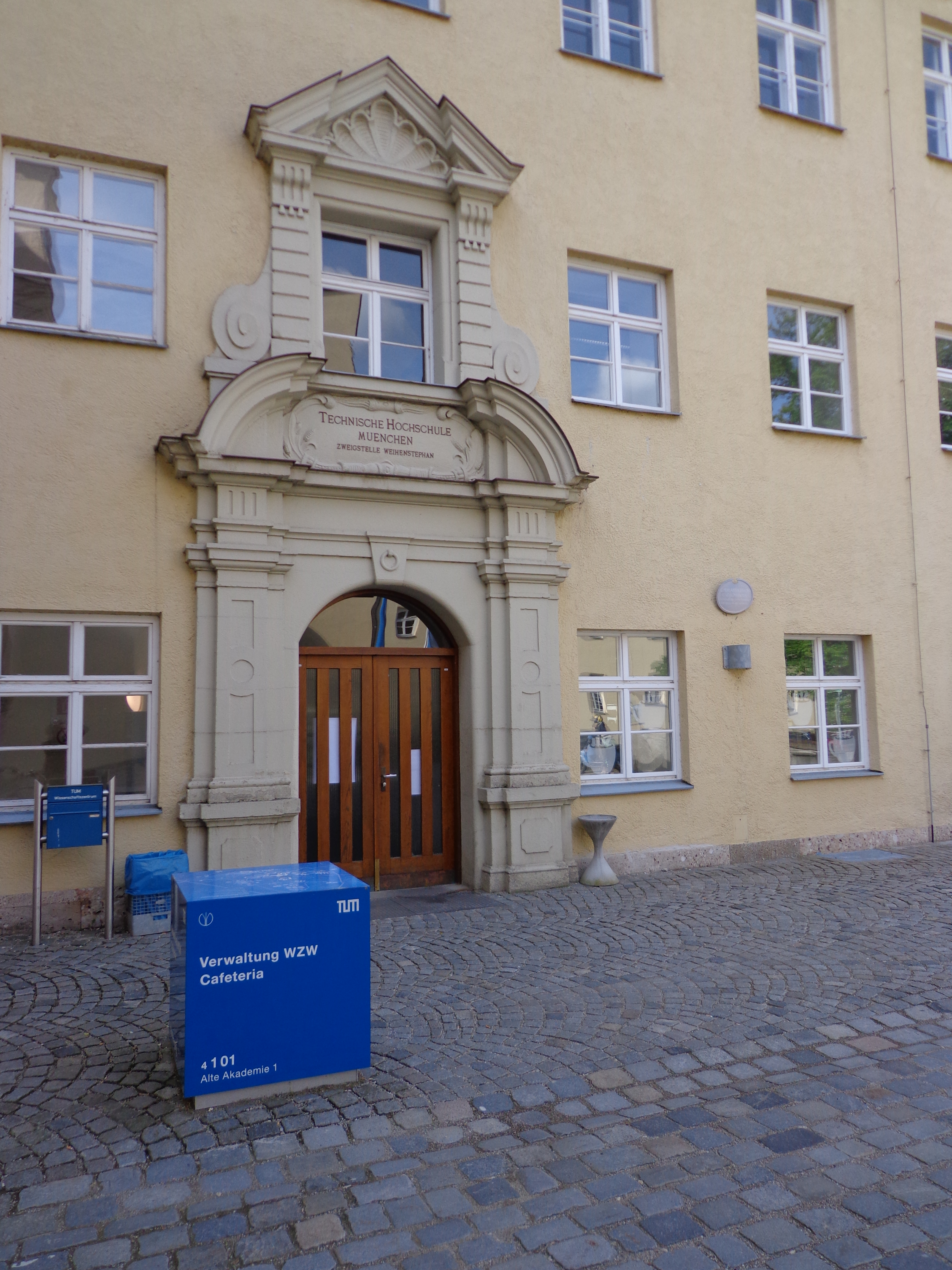 Der Eingang zur Alten Akademie. Noch erhaltene Gebäude des Klosters Weihenstephan, die jetzt die Verwaltung des Wissenschaftszentrums Weihenstephan der TUM beherbergen.